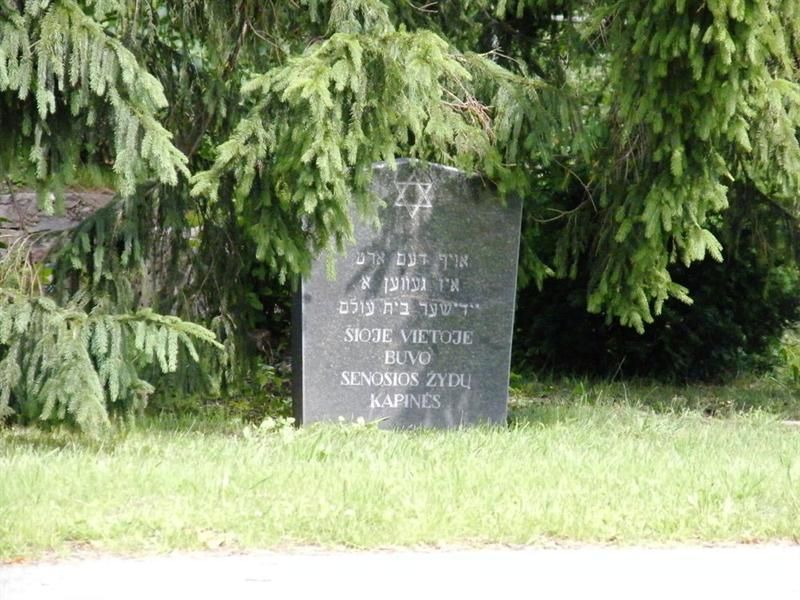 Kupiškio žydų pirmosios senosios kapinės